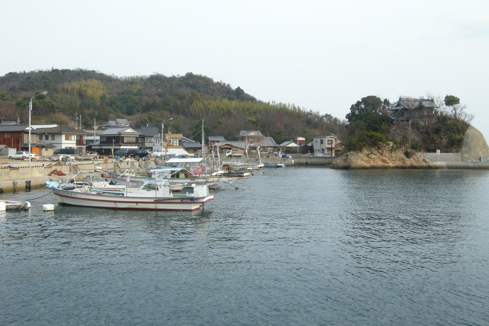 倉橋町鹿老渡 Kurahashi-cho karouto